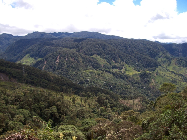 Vista general de la zona